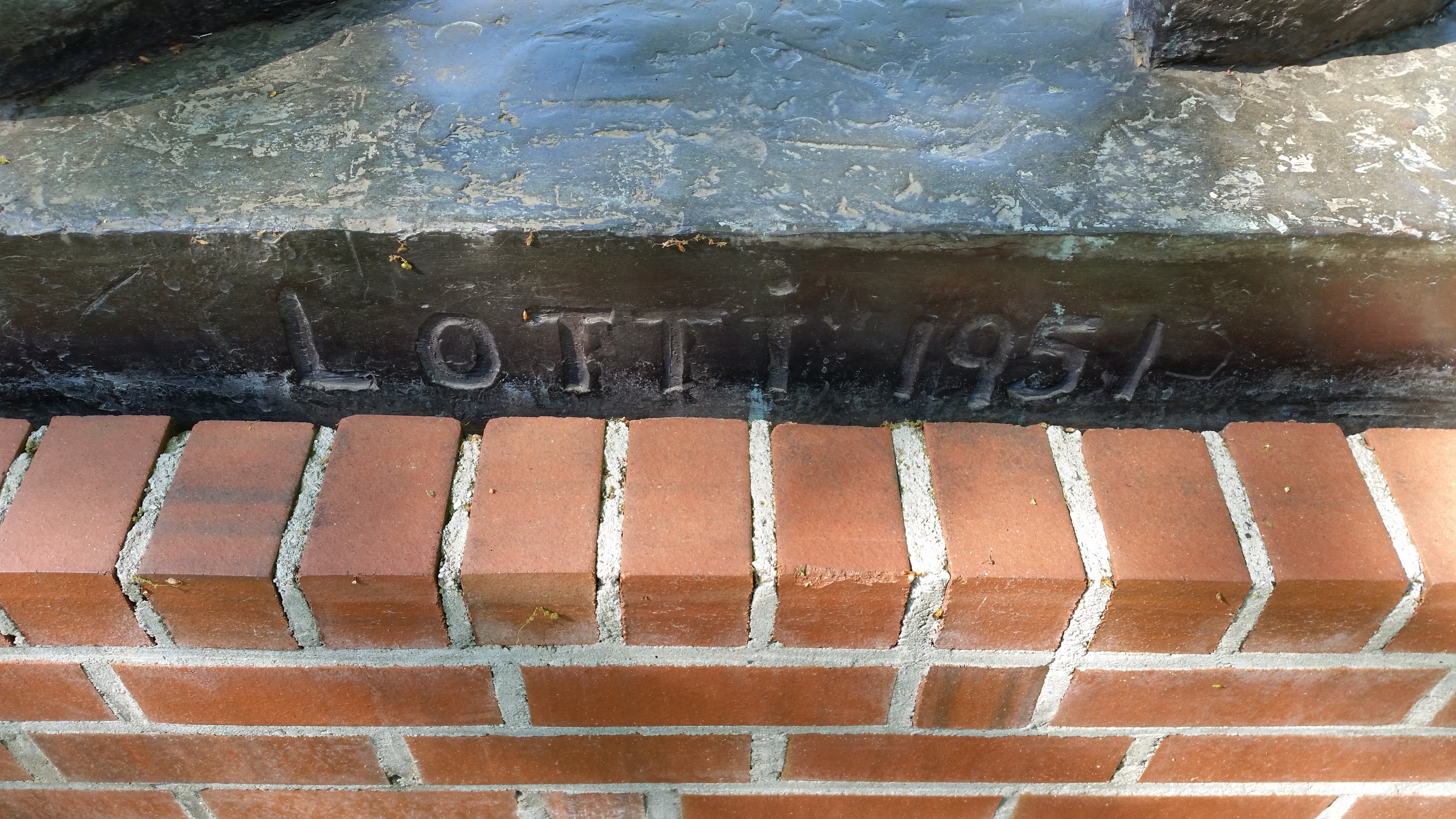 Impressie van De gek van Lotti van der Gaag, Amstelveen (april 2020)